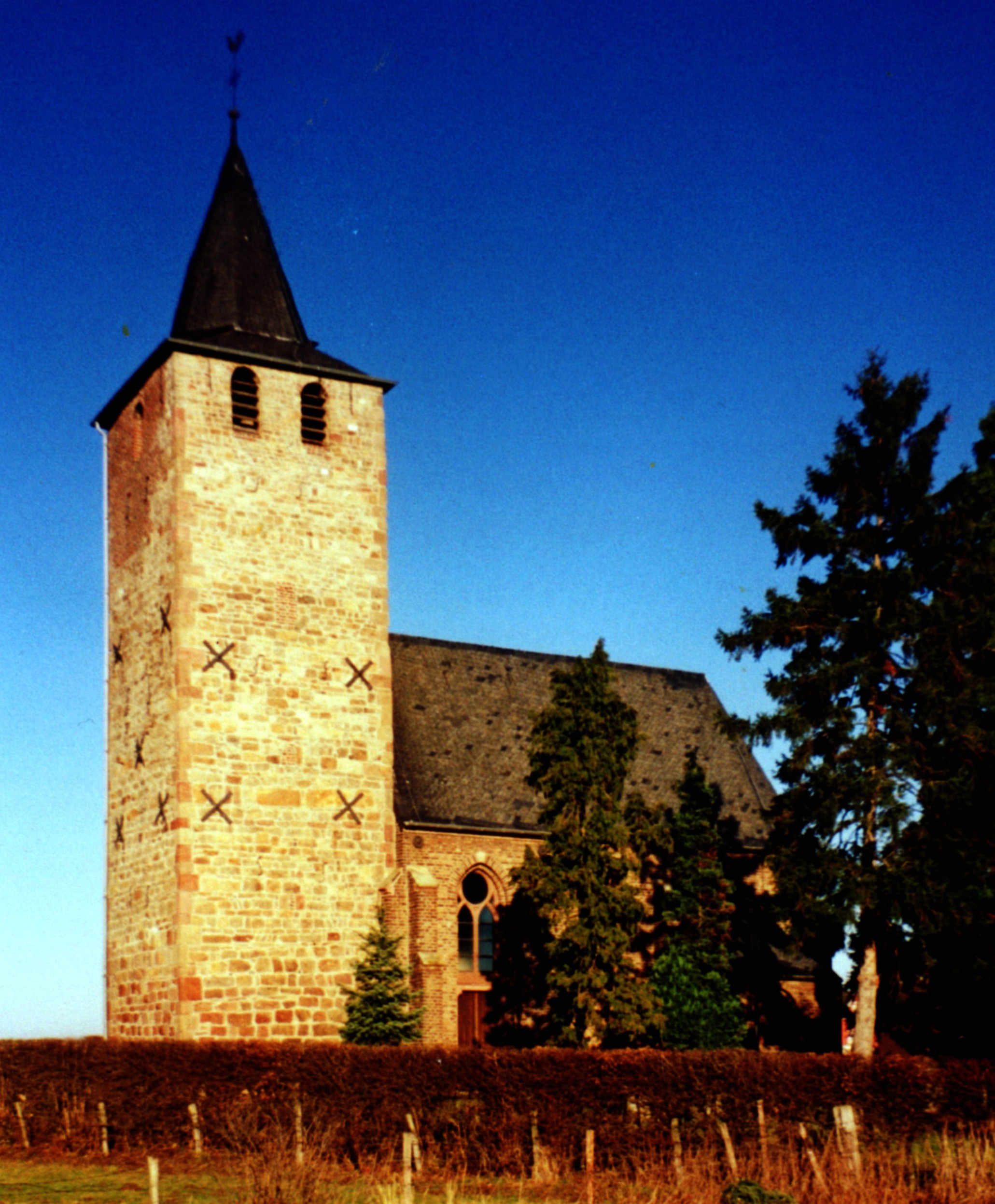 Uhledöömche in Düren-Distelrath